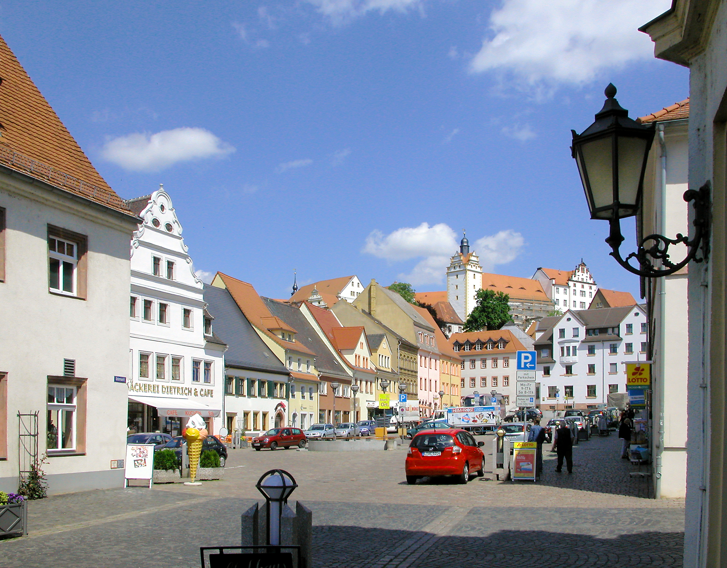 13.05.2009 04680 Colditz: Blick vom Untermarkt über den Markt (GMP: 51.129387,12.806050) zum Schloß. [DSCN37375.TIF]20090513240DR.JPG(c)Blobelt